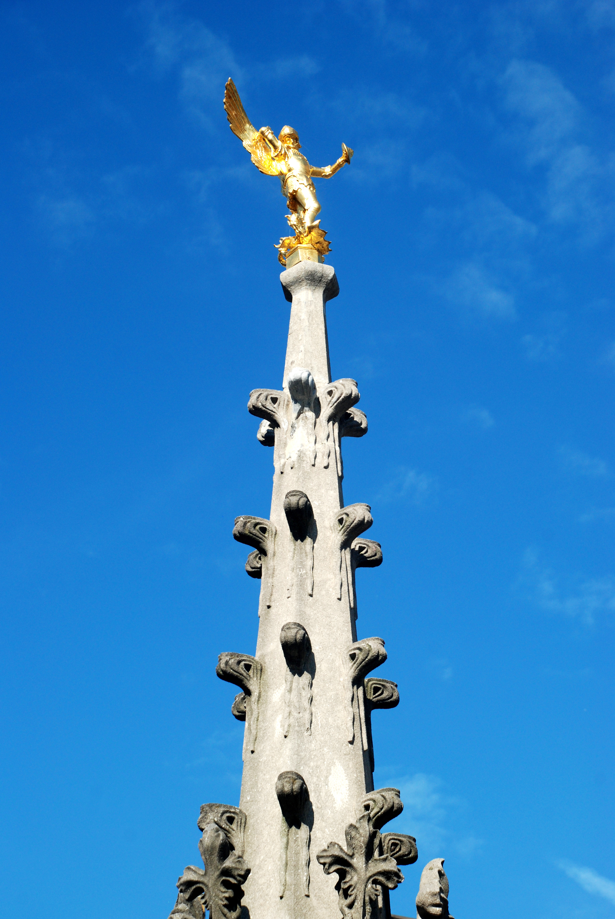 Belgique - Brabant wallon - Fontaine-perron de Nivelles